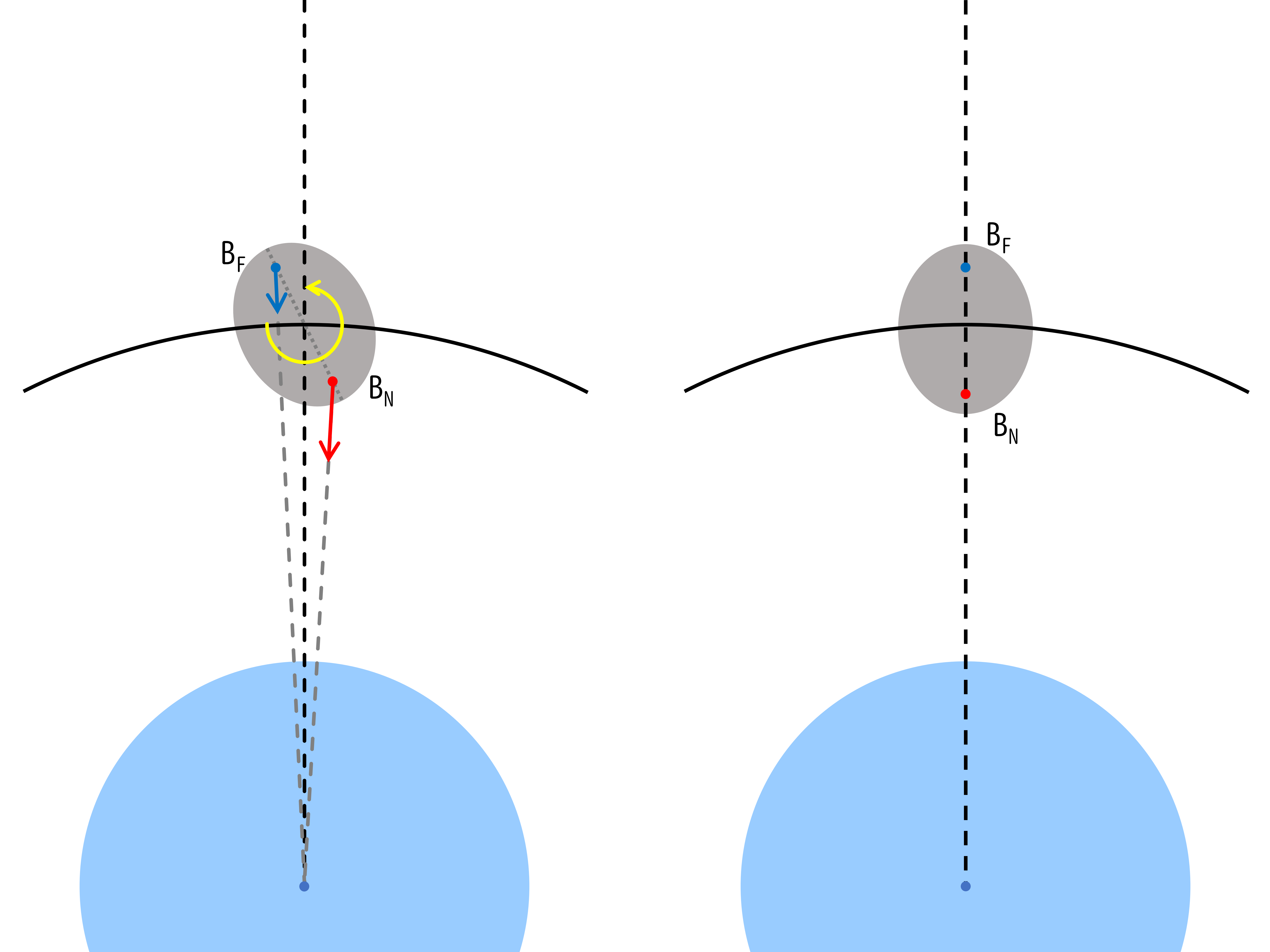 同期回転に関する説明用の図。PowerPoint2016を用いて作成。